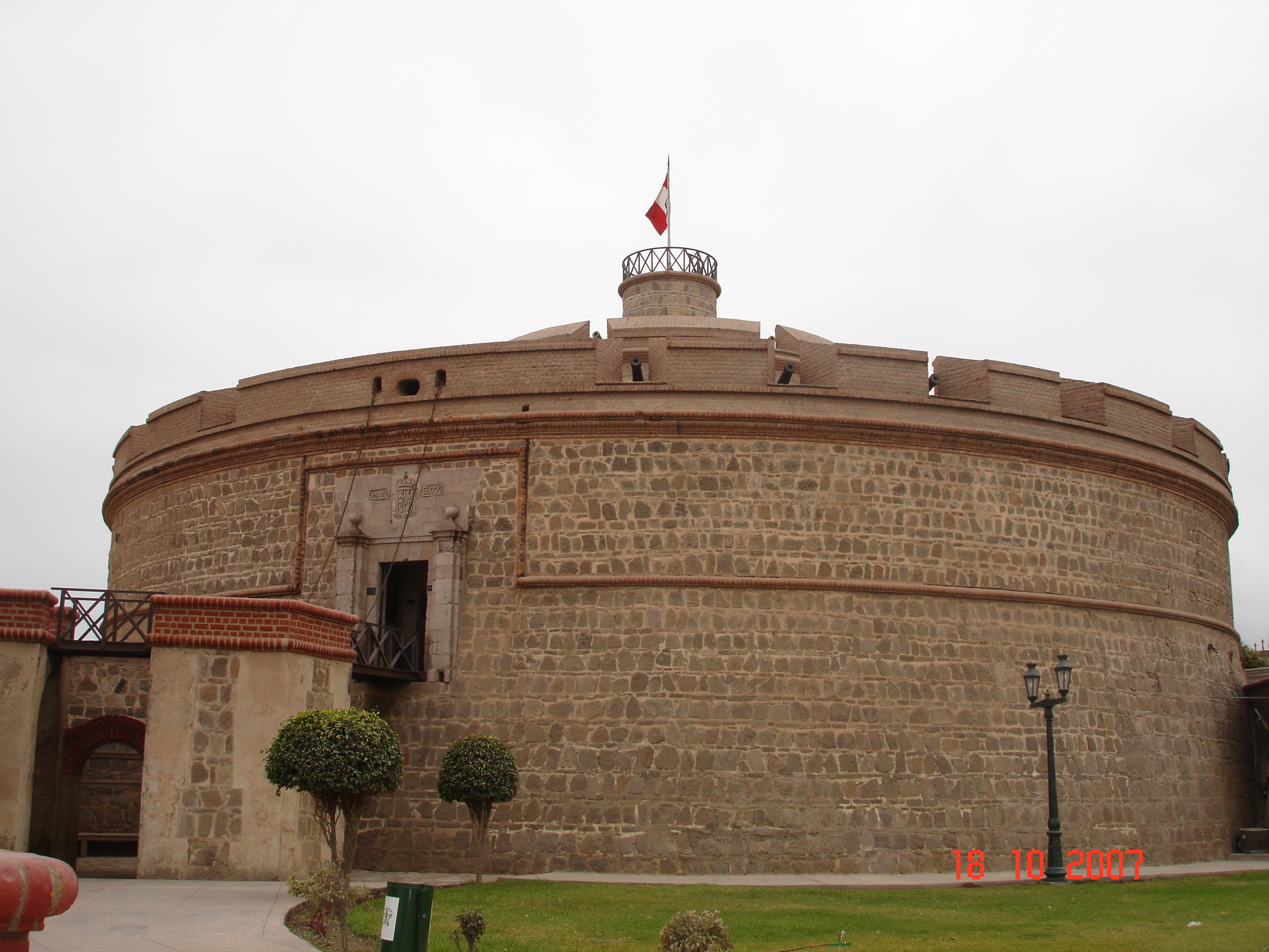 Fortaleza del Real Felipe, Torre del Rey